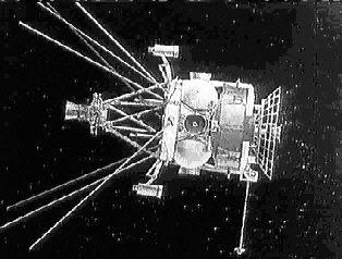 Sowjetischer ASAT-Satellit, wahrscheinlich aus den 60-er Jahren des 20. Jahrhunderts